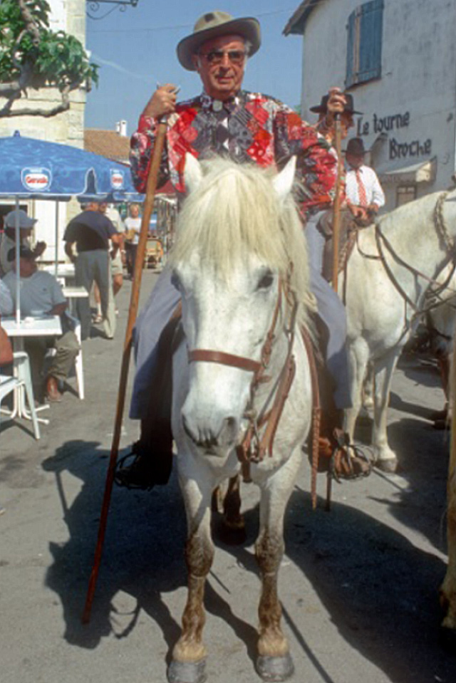 Gardian lors du pèlerinage gitan aux Saintes-Maries-de-la-Mer